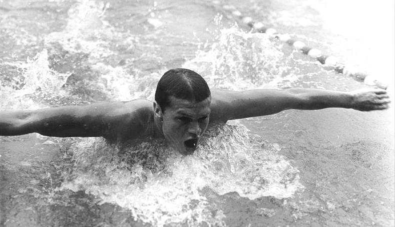 Udo Poser Zentralbild Mittelstädt 29-8-69 Berlin:Deutsche Meisterschaften der DDR im Sportschwimmen vom 28. bis 31.8.69 im Friesenstadion-In der neuen DDR-Rekordzeit von 2:08,1 min über 200-m-Delphin erkämpfte sich Udo Poser (ASK Vorwärts Rostock) den Titel. Auch über 100-m-Freistil war Udo Poser erfolgreich.